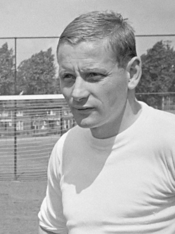 Training Feyenoord, de nieuwe aanwinsten v.l.n.r. Leyten [hulptrainer?], trainer Kment, Fransen en Weering 6 augustus 1965